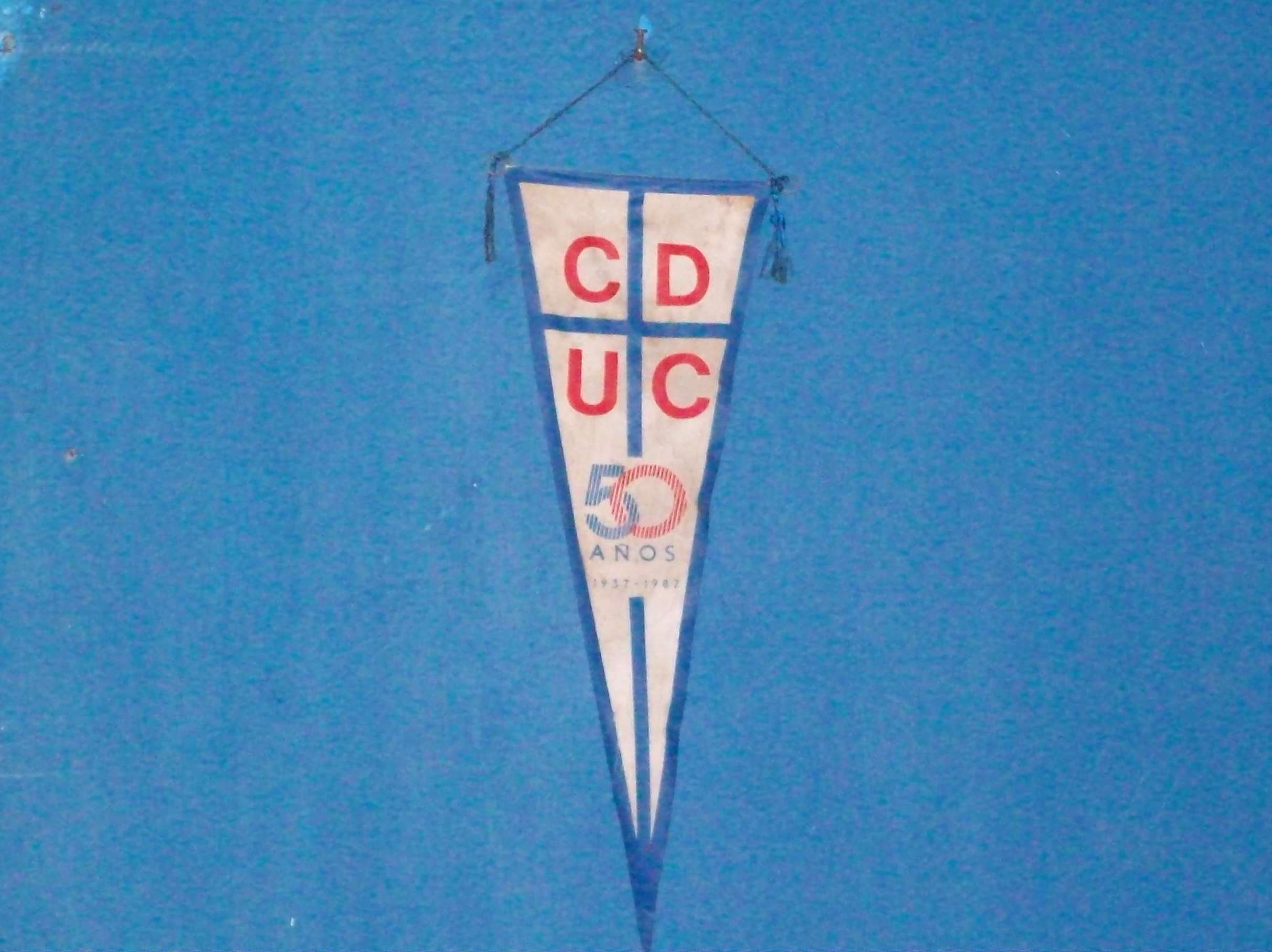 Banderín del 50º Aniversario del Club Deportivo Universidad Católica de Chile.